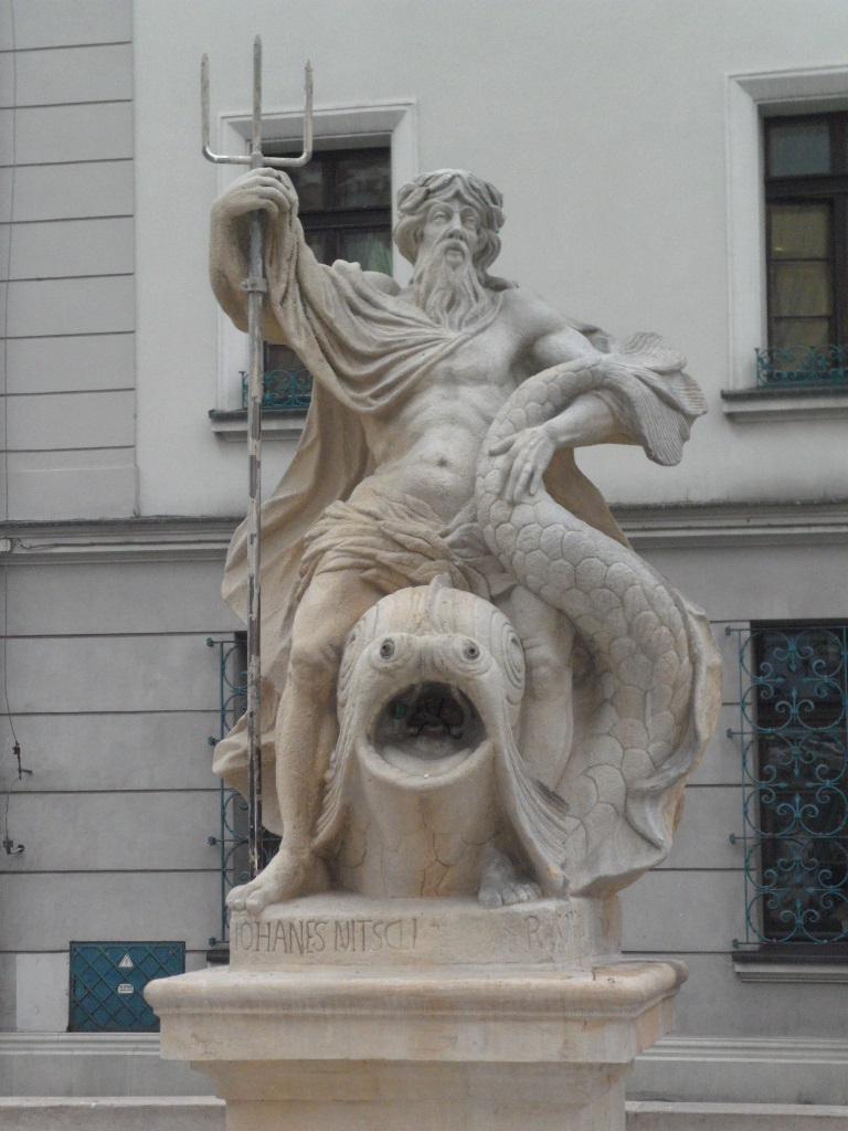 Schläsch: Der Gleiwitzer Gabeljerge ies a Neptunborn ei der Aaltstoadt vu Gleiwitz